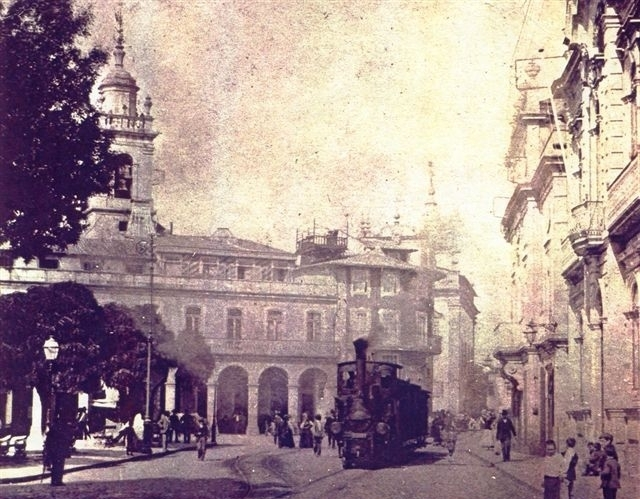 Composição do comboio a vapor urbano de Braga, Portugal, ~1910, circulando na Praça da República.